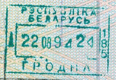 Passport stamp from Hrodna.